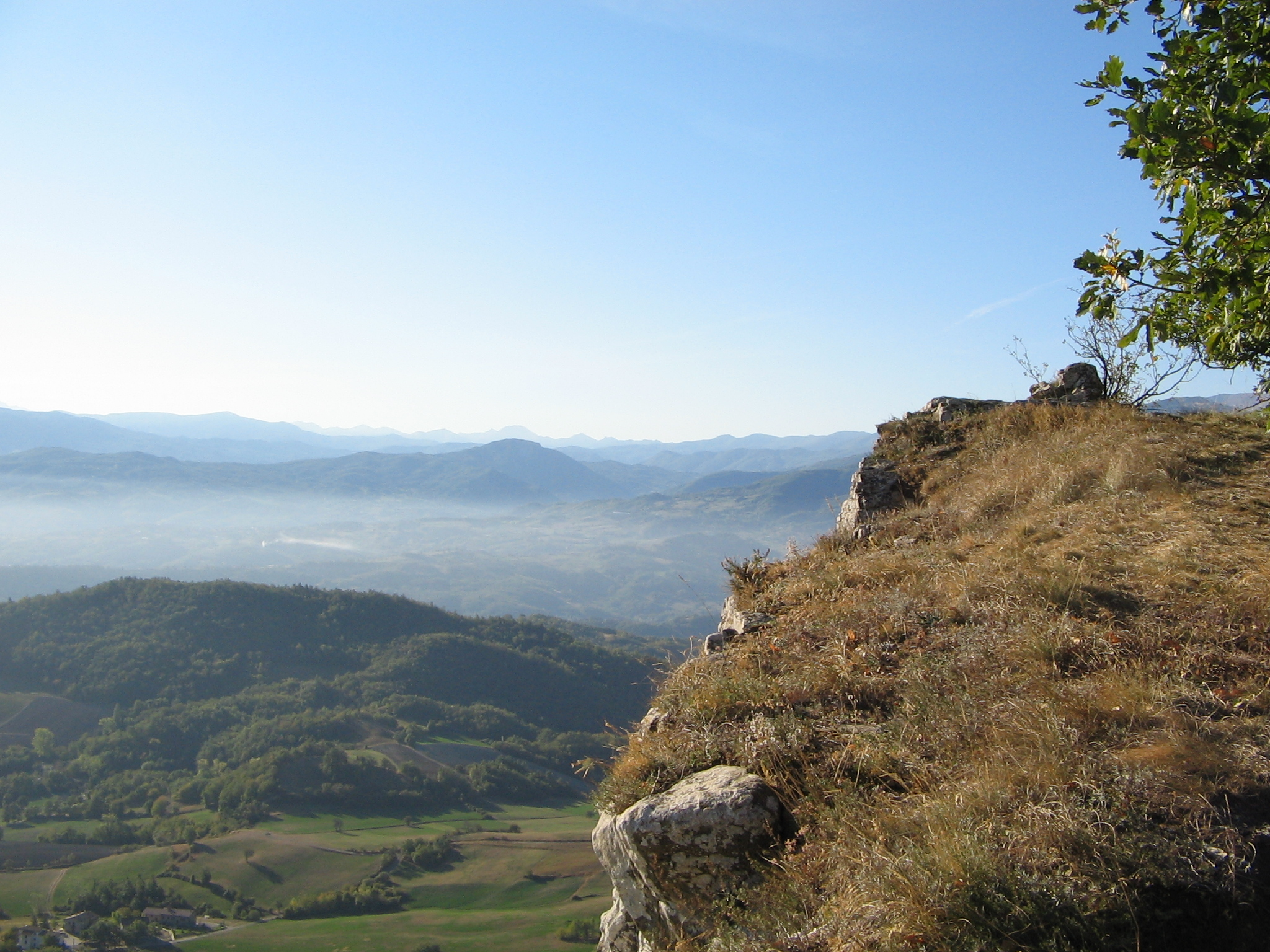 Via Ferrata Pietra di Bismantova - arrivo e vista appennini